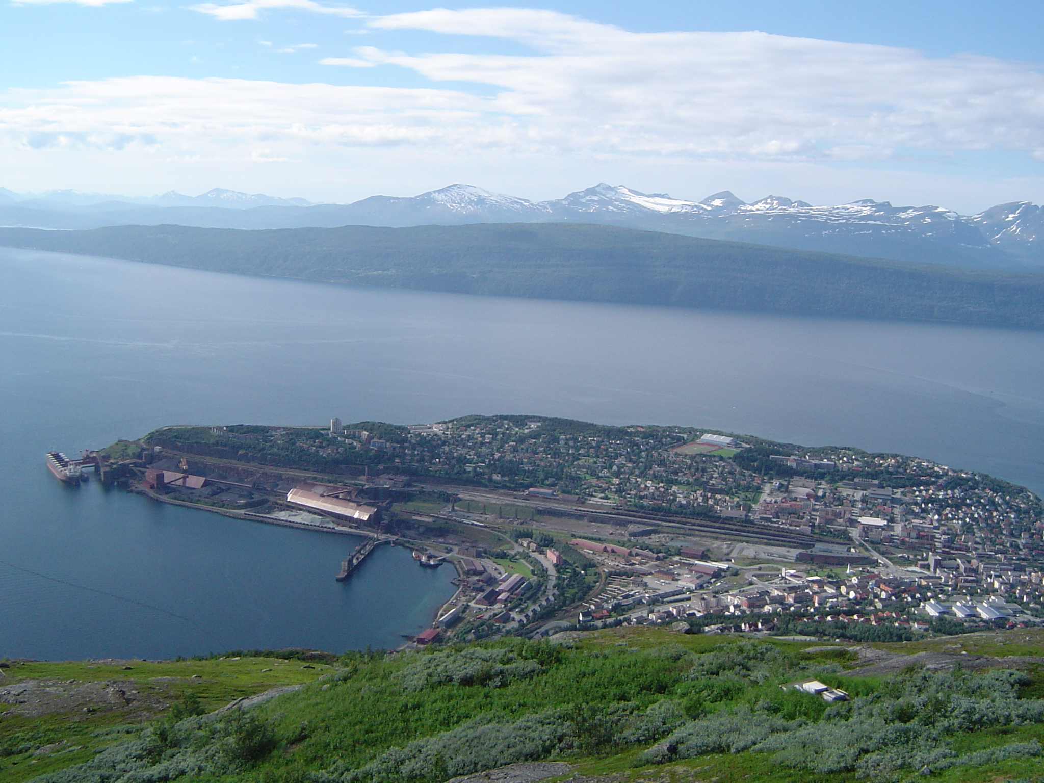 Narvik von Oben.